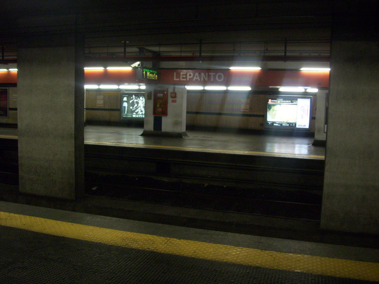 La stazione di Lepanto a Roma